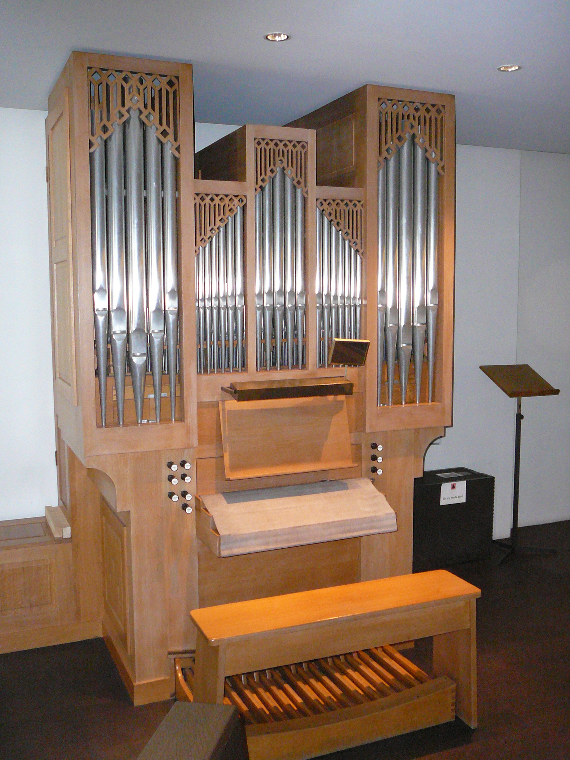 Römisch-katholische Kirche Sainte Famillie in Zürich, Mathis-Orgel